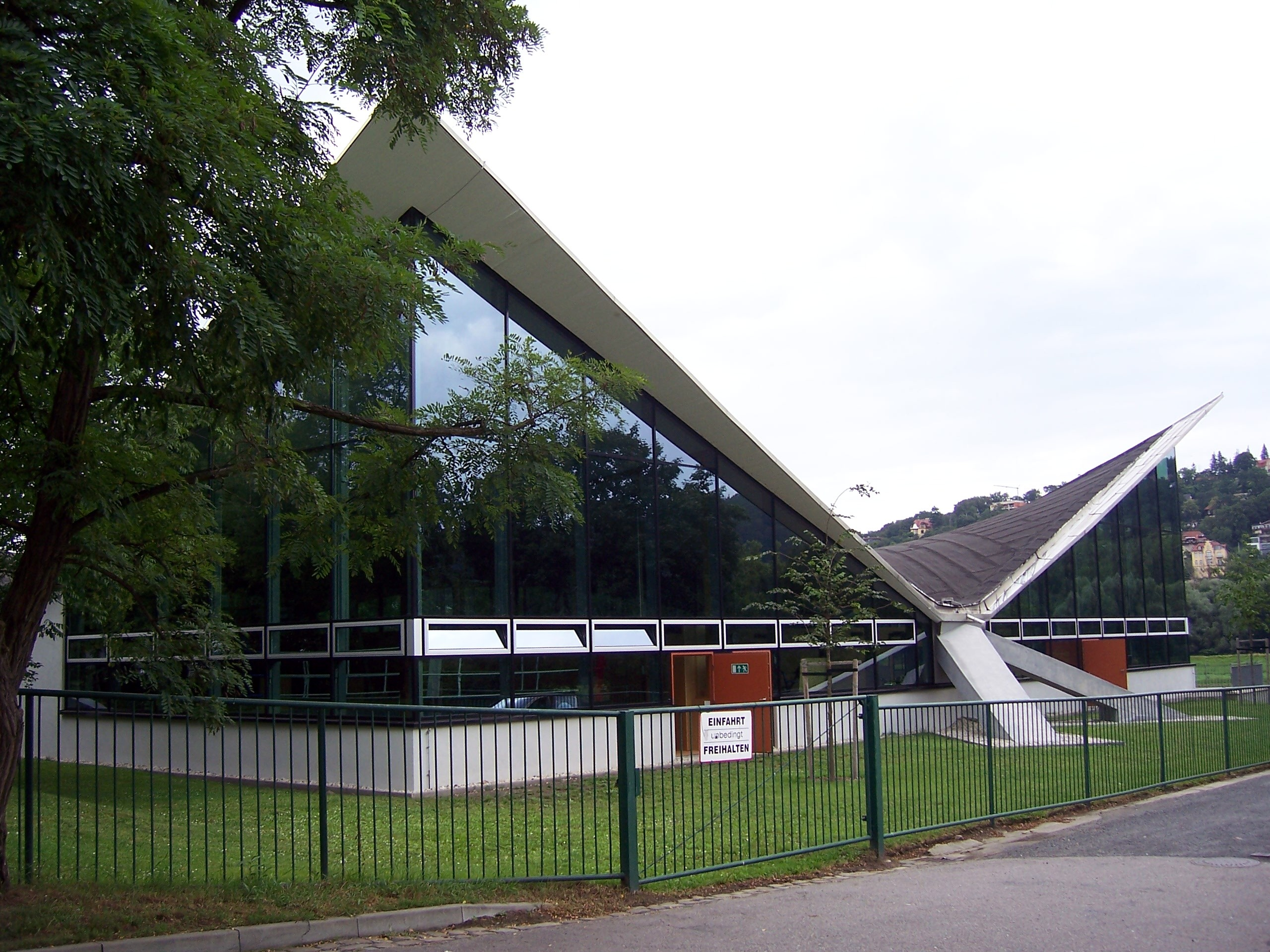 Ruderzentrum in Dresden-Blasewitz, Dachkonstruktion von Ulrich Müther.